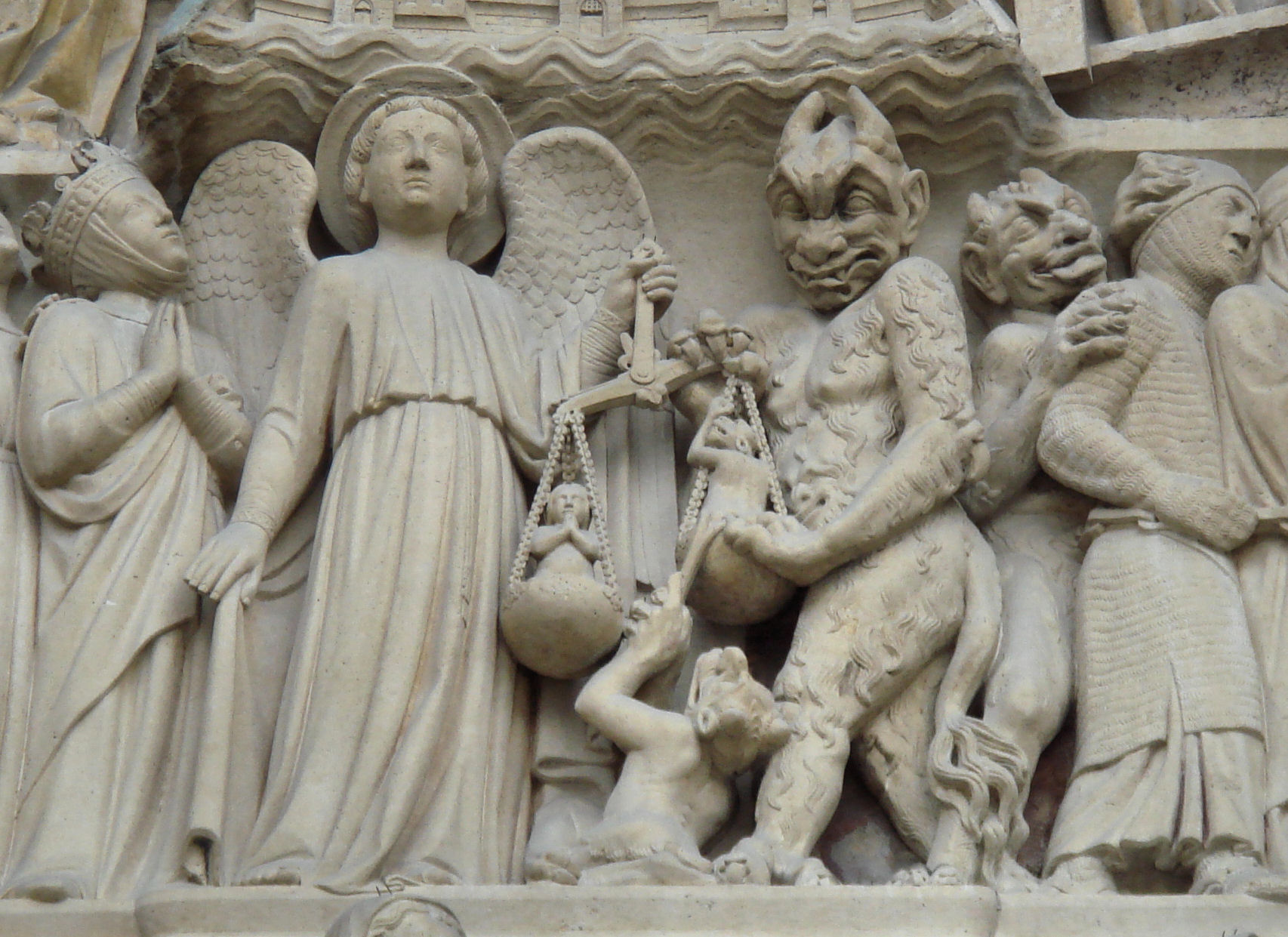 Devil, Central Gate Notre Dame Paris